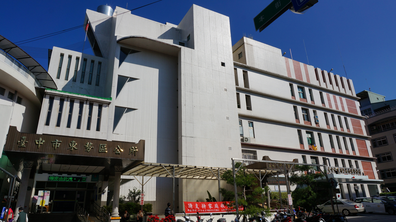 中文（台灣）: 臺中市東勢區公所（左）、臺中市東勢區戶政事務所（中）、臺中市政府警察局東勢分局（右）。